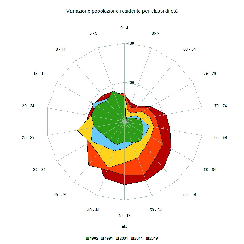 Oriolo Romano variazione demografica classi età 1982-2019